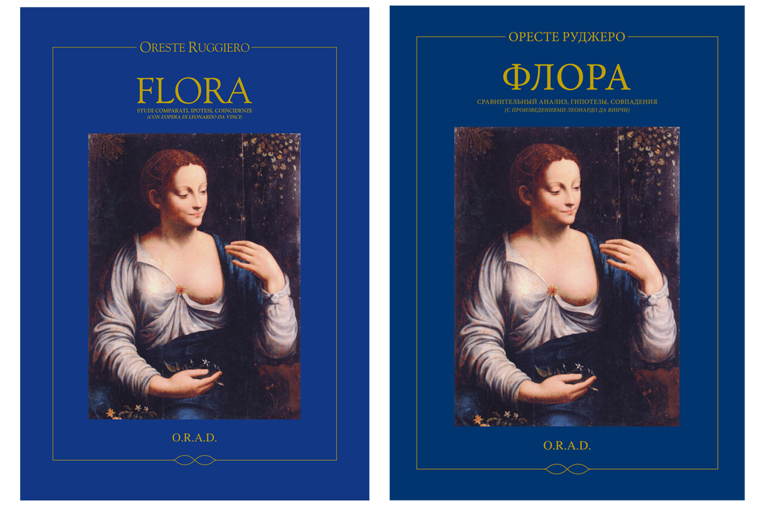 Copertina Flore